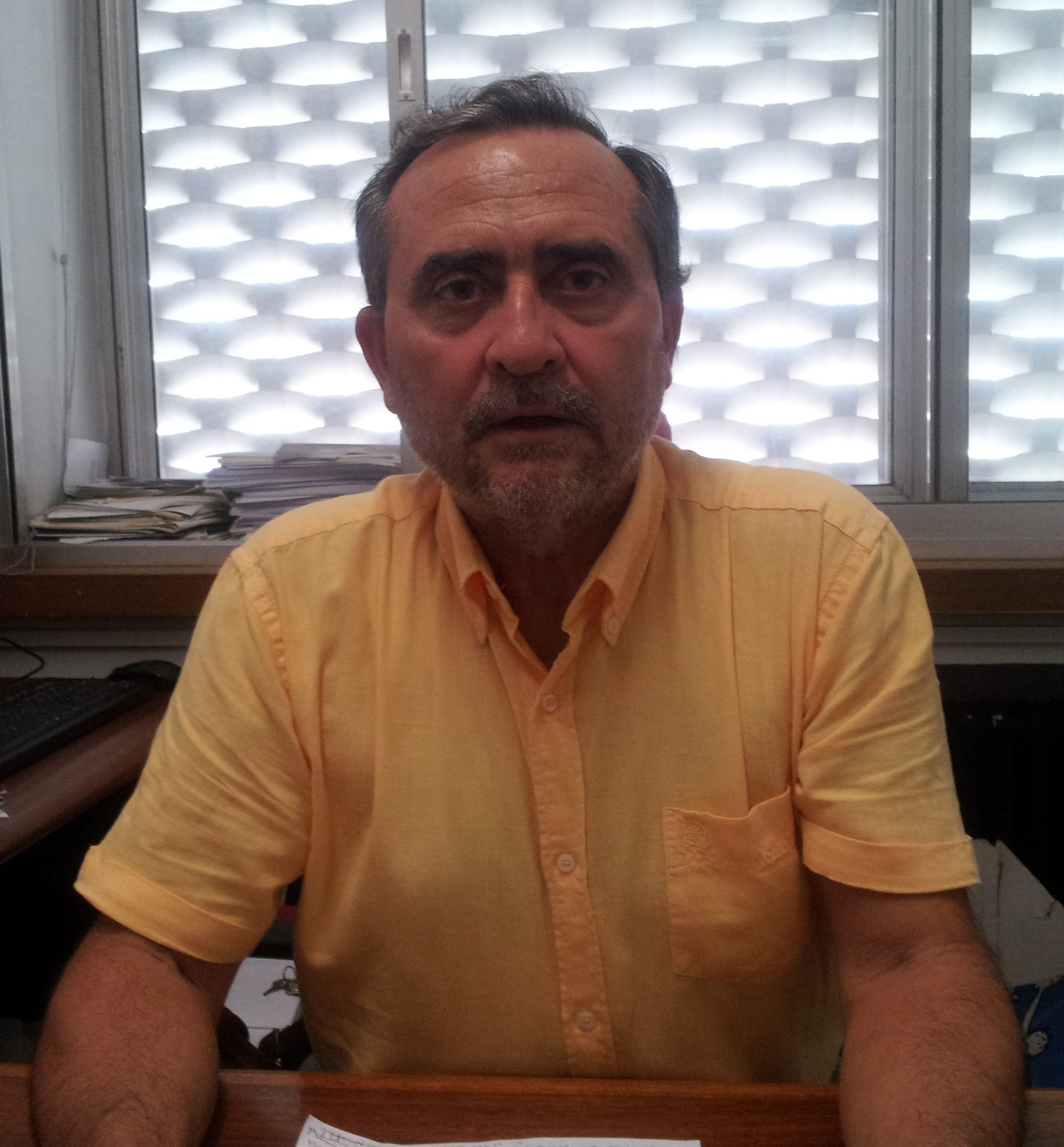 El lingüista Abelard Saragossà